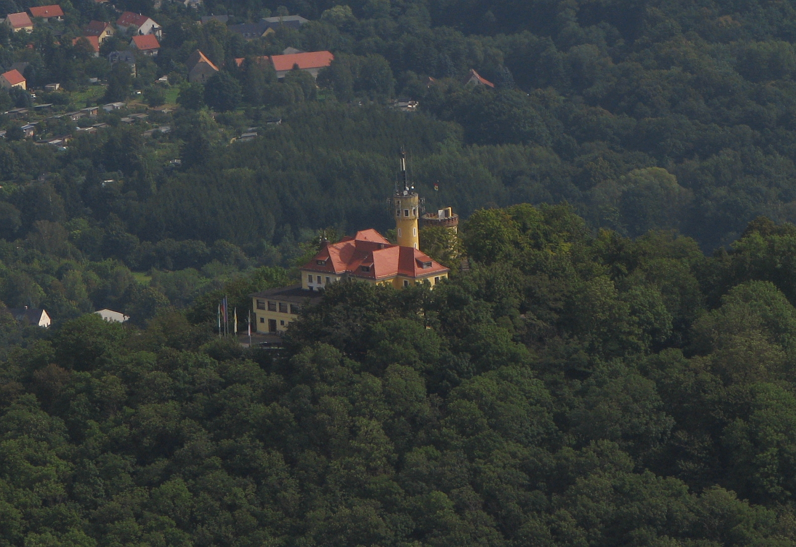 Görlitz Luftbild - Landeskrone vulkanischer Hausberg Burg Burg von 1268 Herren von Bieberstein Turm von 1796 Foto 2008 Wolfgang Pehlemann Wiesbaden IMG_0011